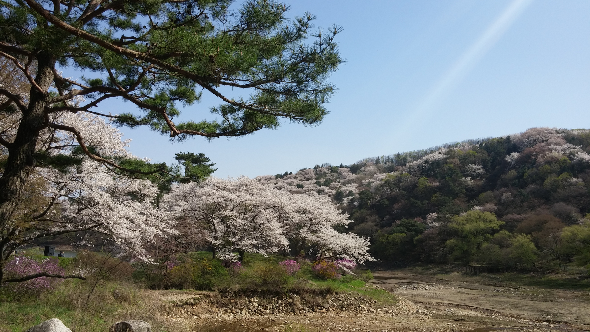 호암 벚꽃 축제